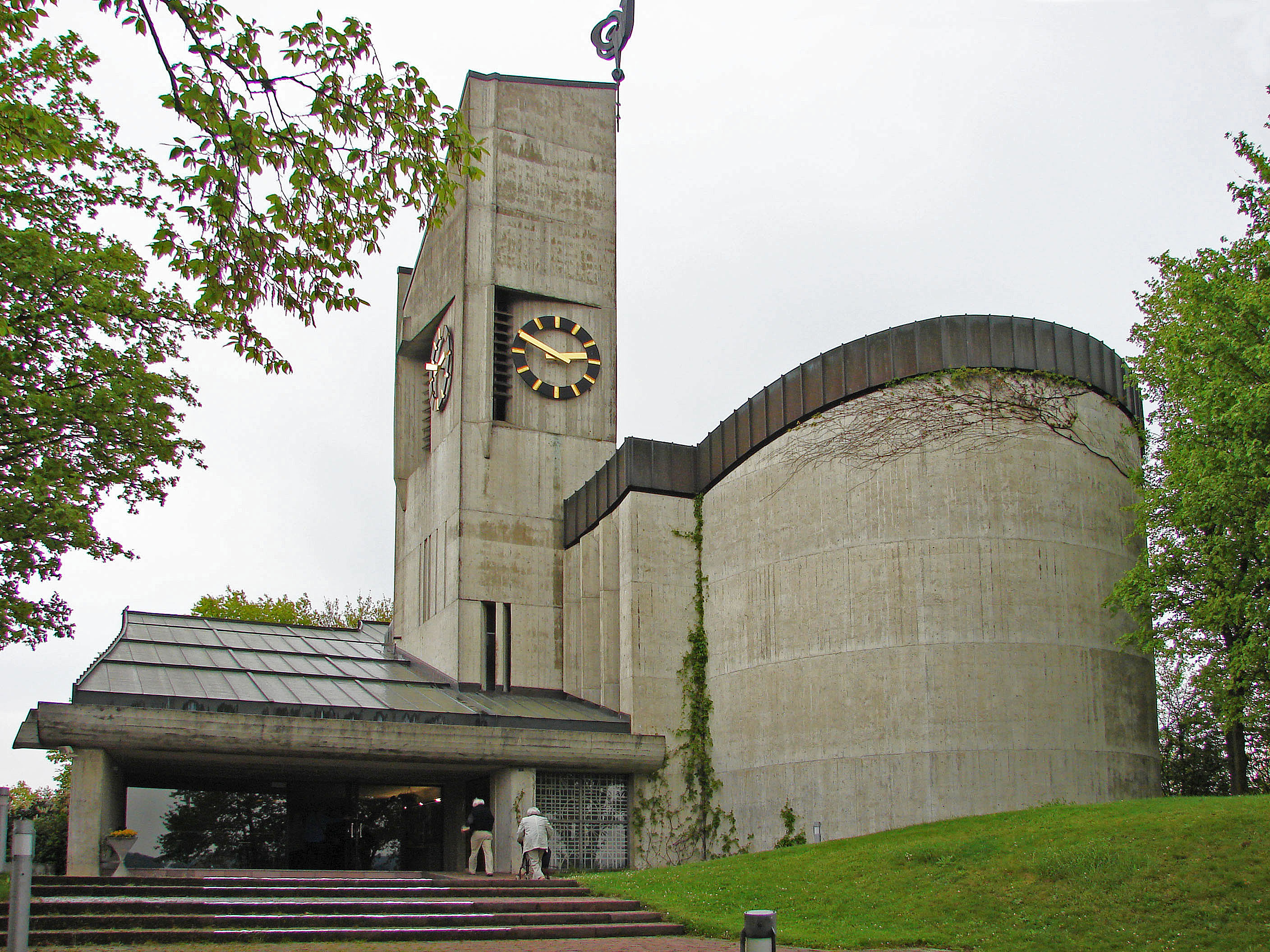 Eingang, Kirche und Turm